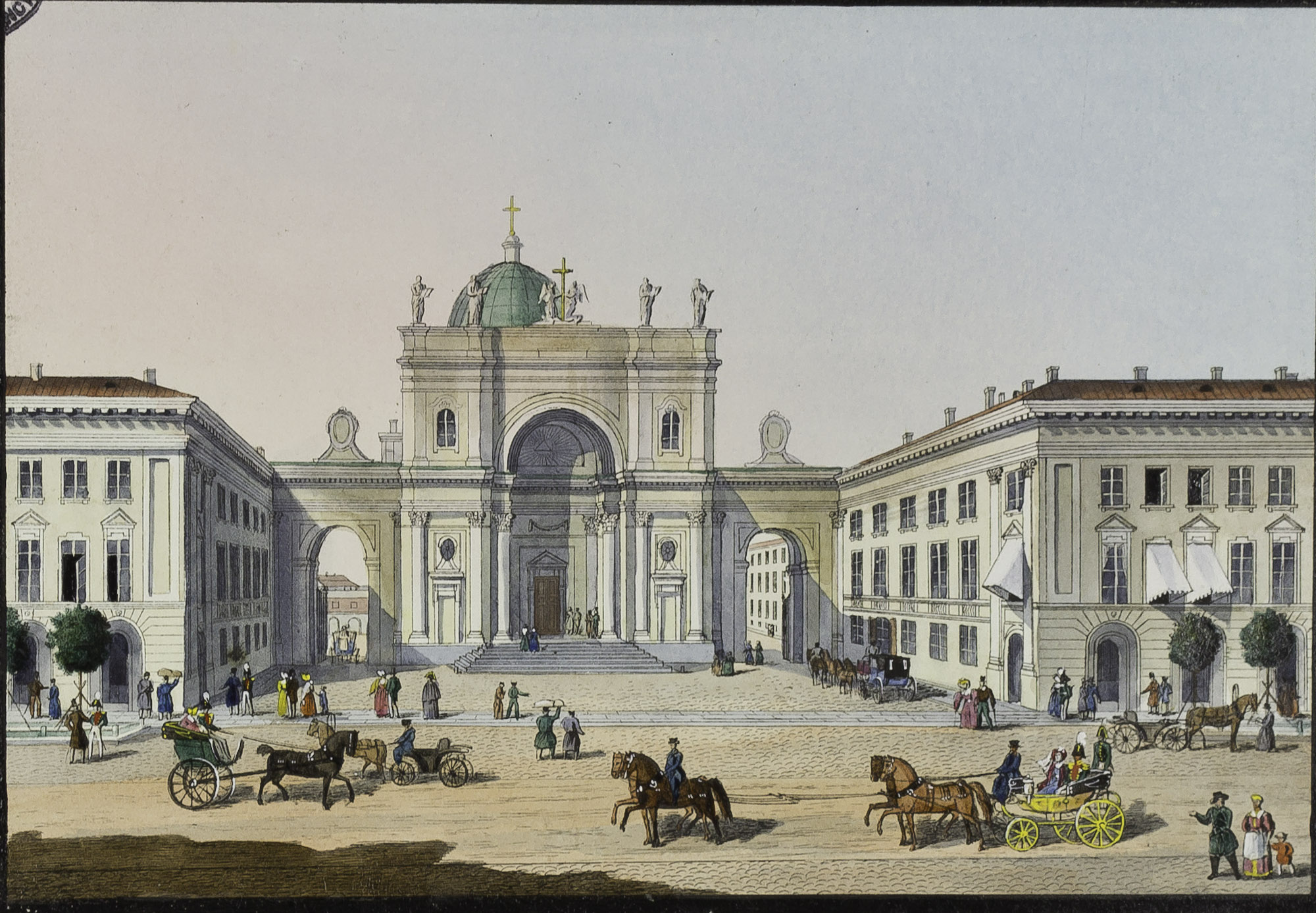 Enluminure de Ch. Beggrow, Saint Petersbourg.